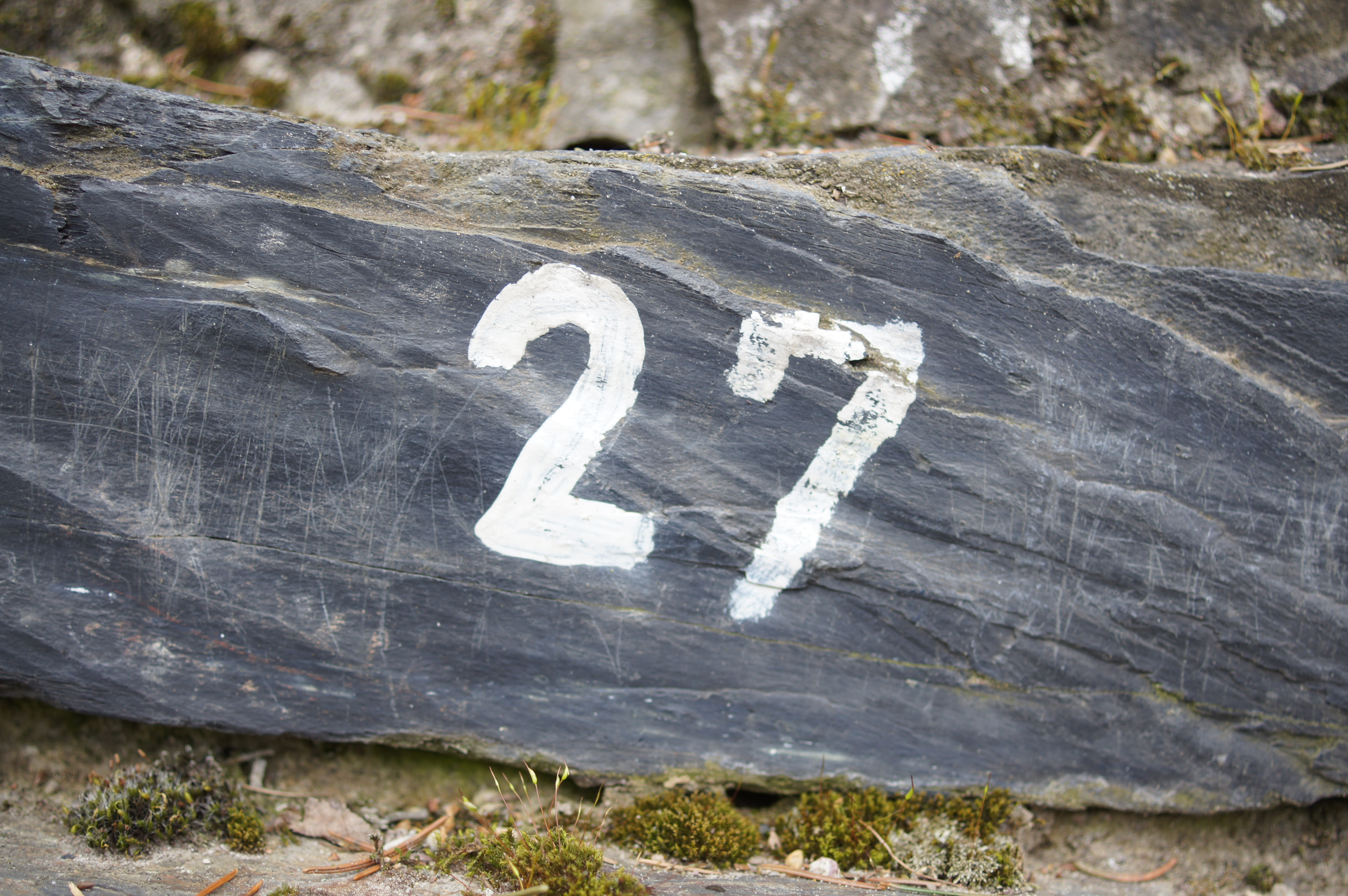 Botanischer Volkspark Blankenfelde-Pankow